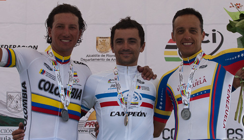 El podio del CRI Elite Campeonato Panamericano de Ciclismo de Ruta. Medellín. 6 de mayo de 2011.